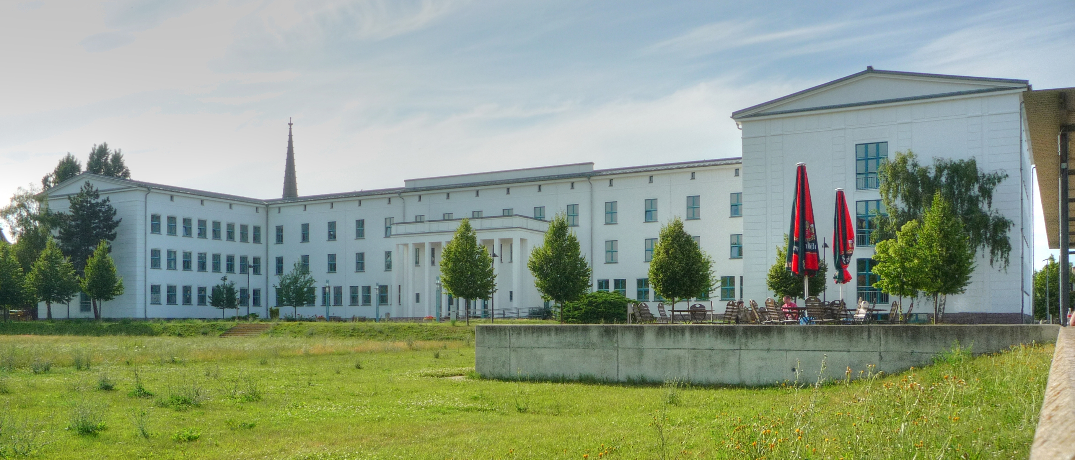 Haus 1 der Fachhochschule der Sächsischen Verwaltung Meißen